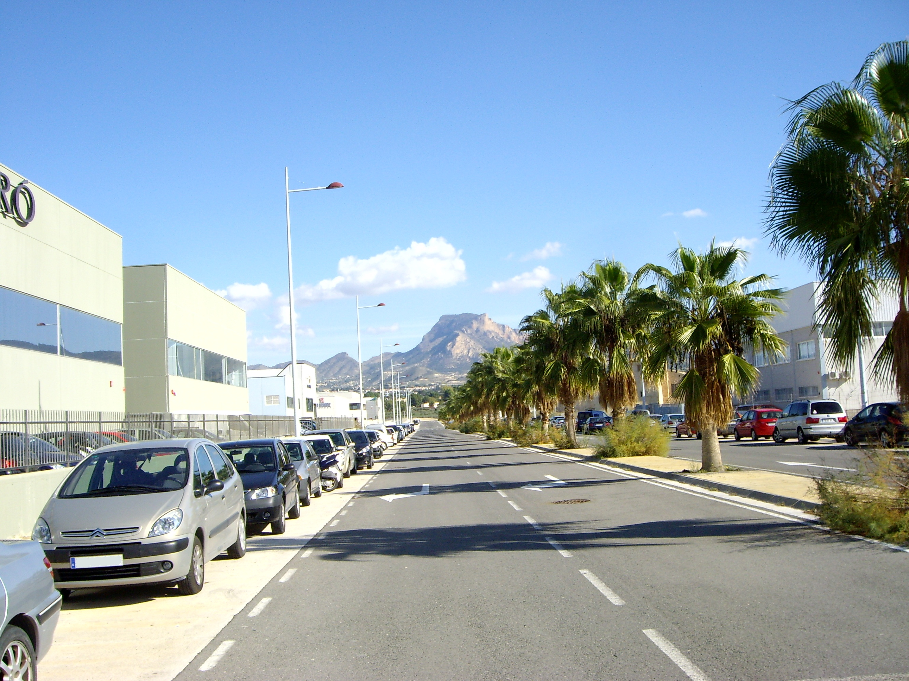 Av. San Luis de Cuba, Elda.